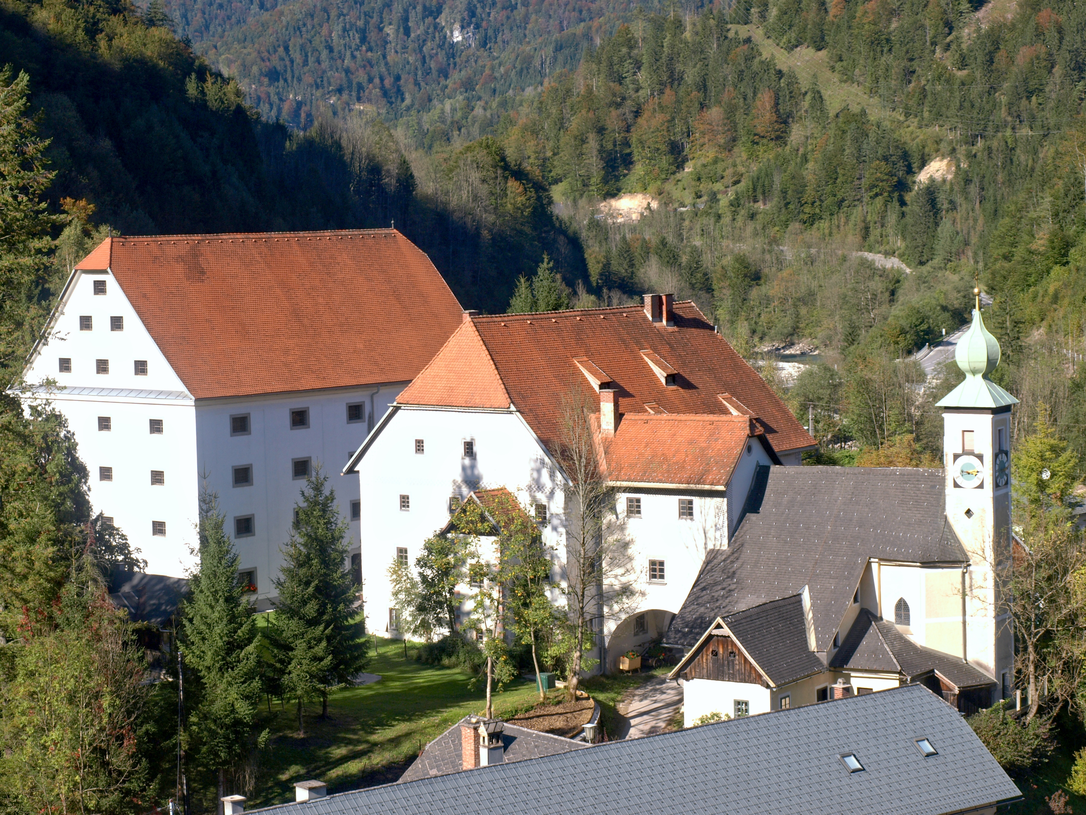 Kath. Filialkirche hl. Nikolaus, Alter Kasten und Neuer Kasten